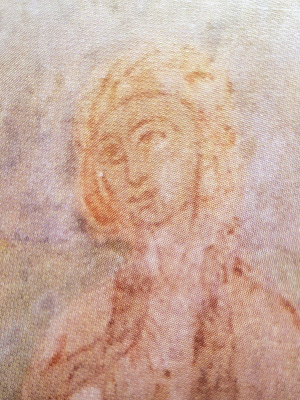 Maria Serbska